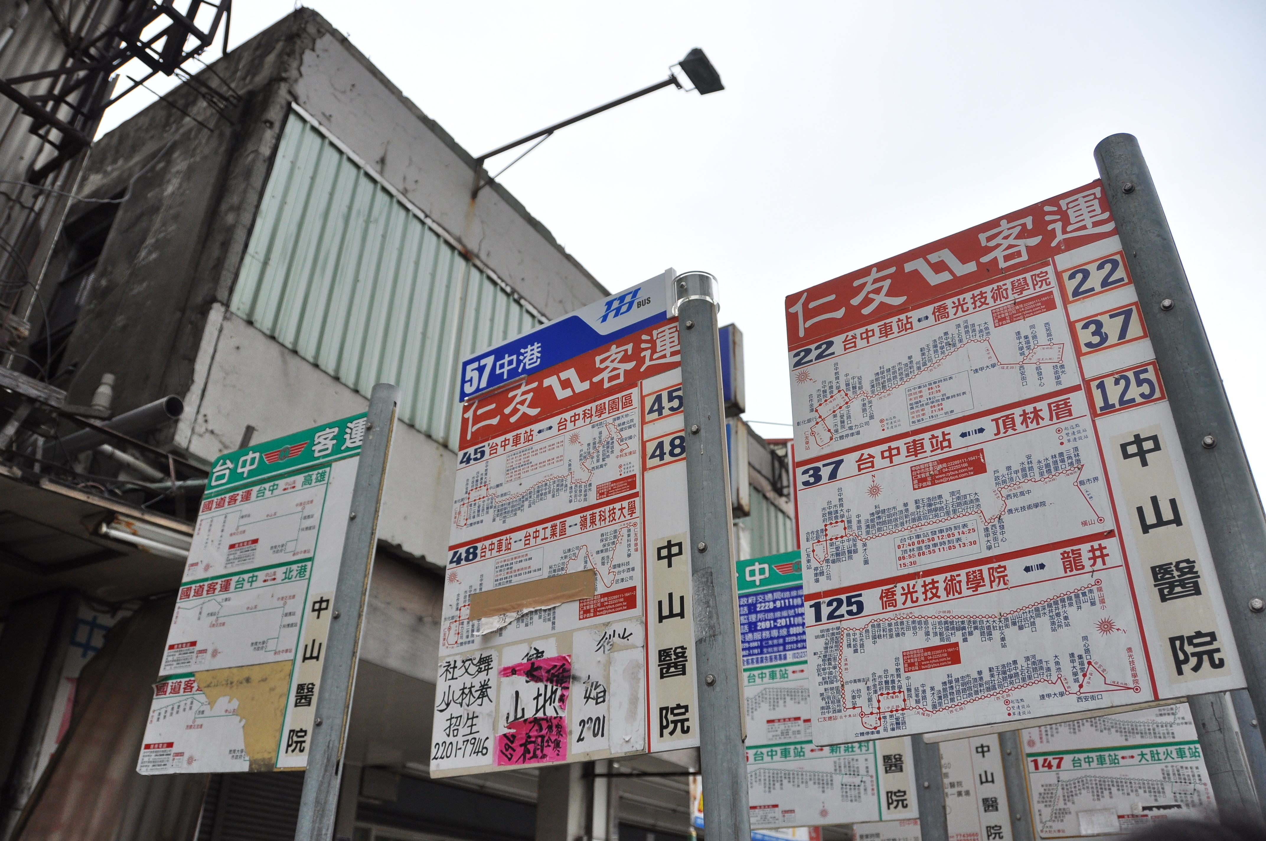 中山醫學大學附設醫院，台中客運、仁友客運、TTJ捷運公車「中山醫院」站牌。